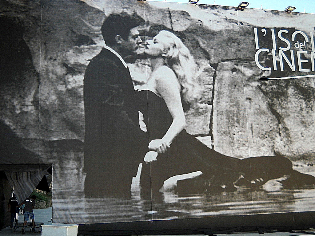 L'isola del cinema